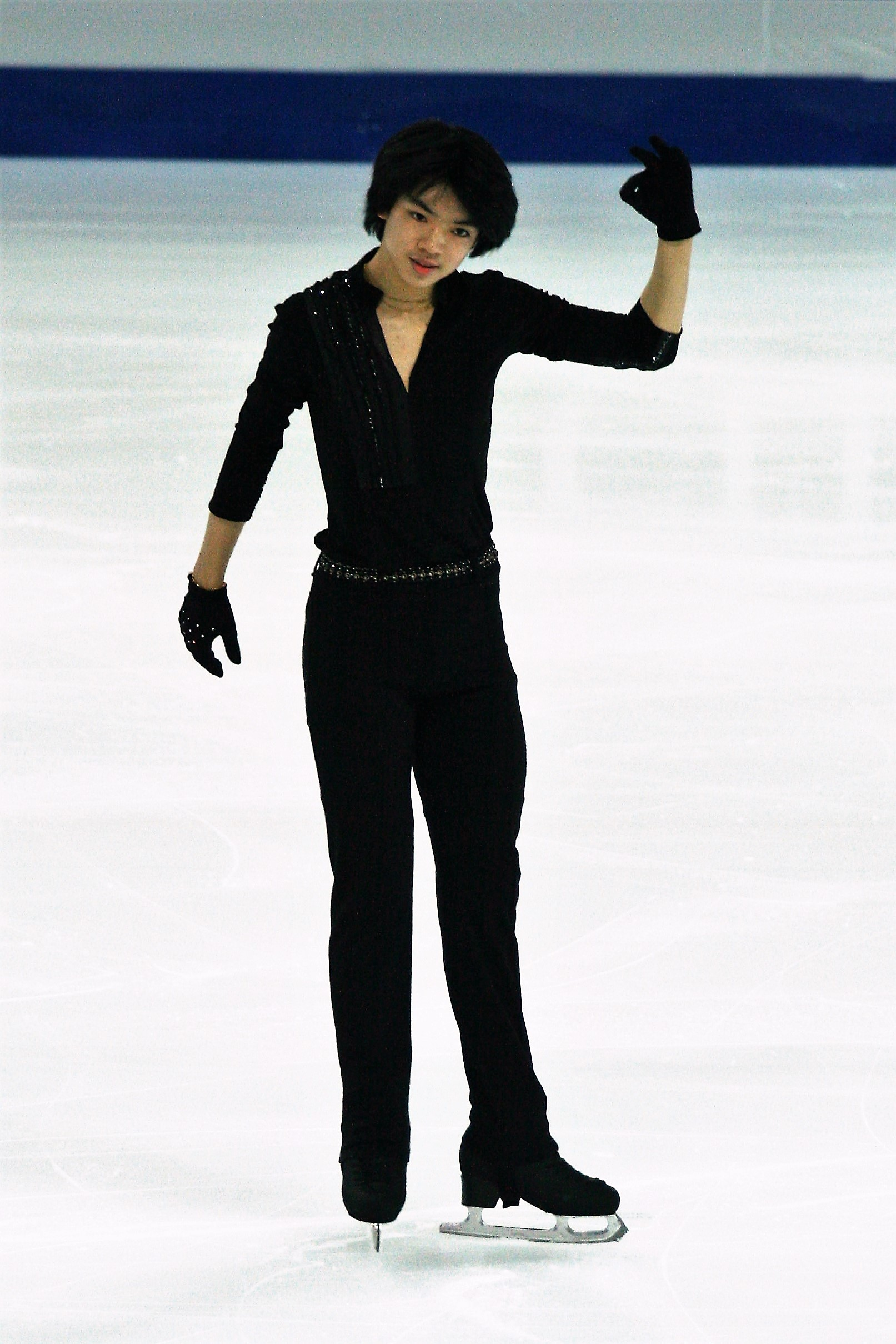 Ча Чжун Хван (Республика Корея) на финале Гран-при по фигурному катанию среди юниоров 2016-2017